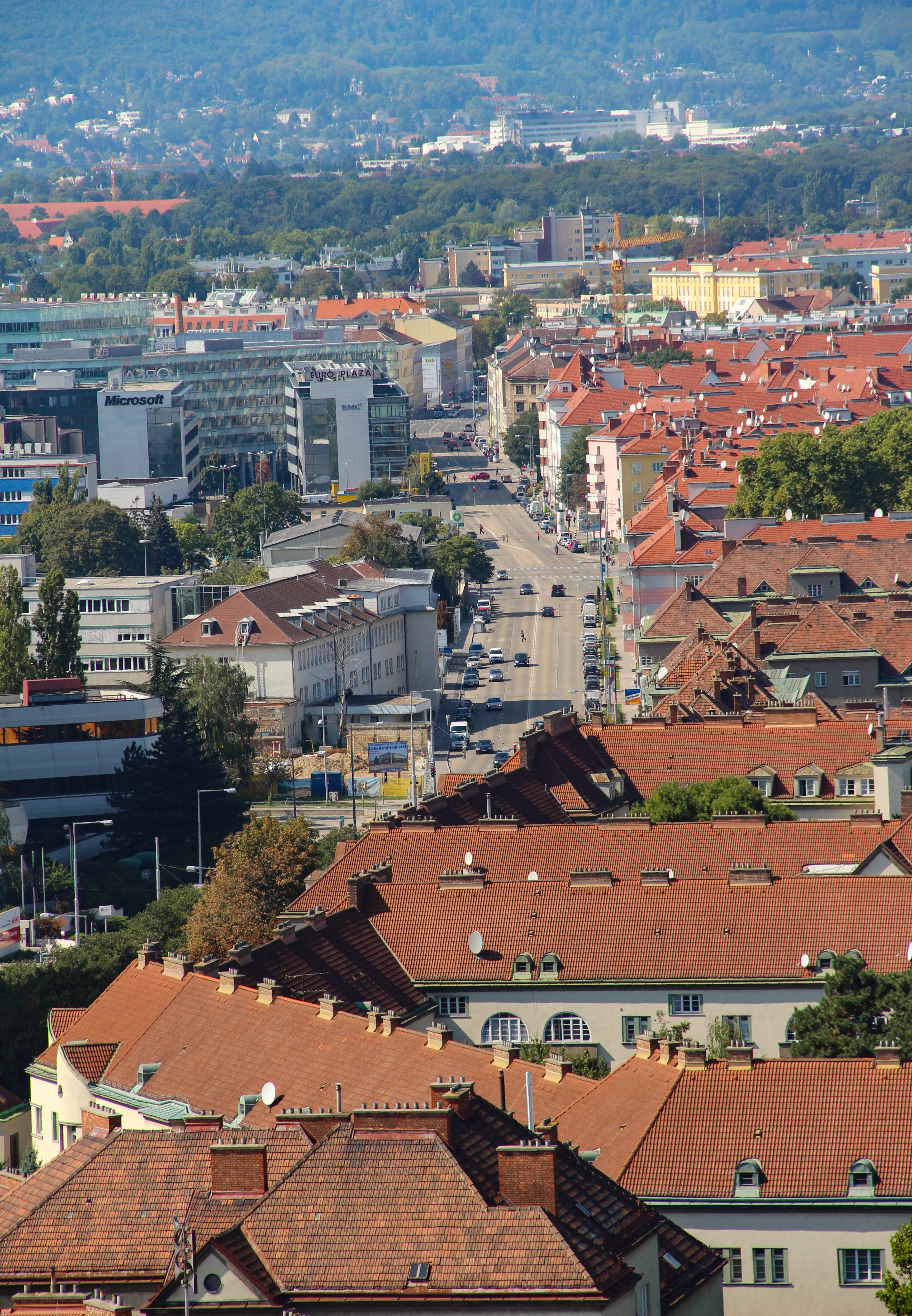 Wienerbergstraße im 10. und 12. Wiener Gemeindebezirk, Ansicht vom Wasserturm Favoriten (Osten).